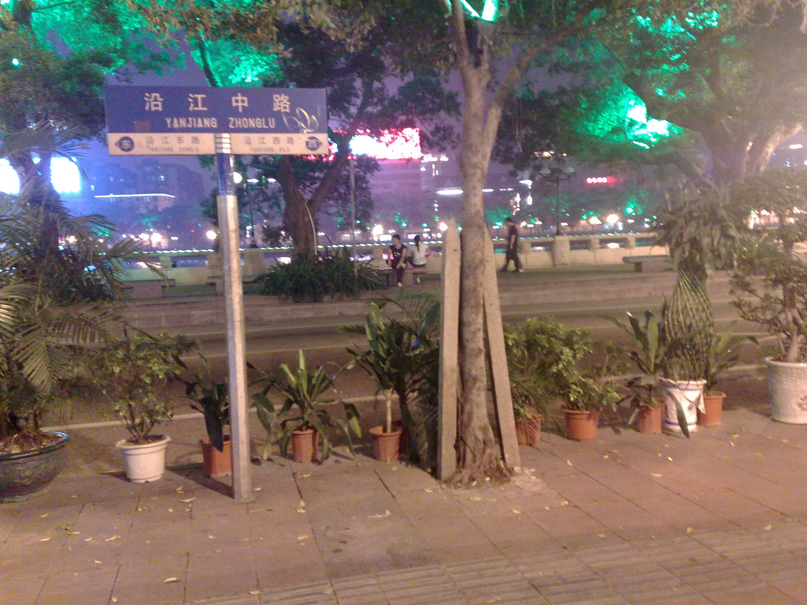 廣州市越秀區沿江中路